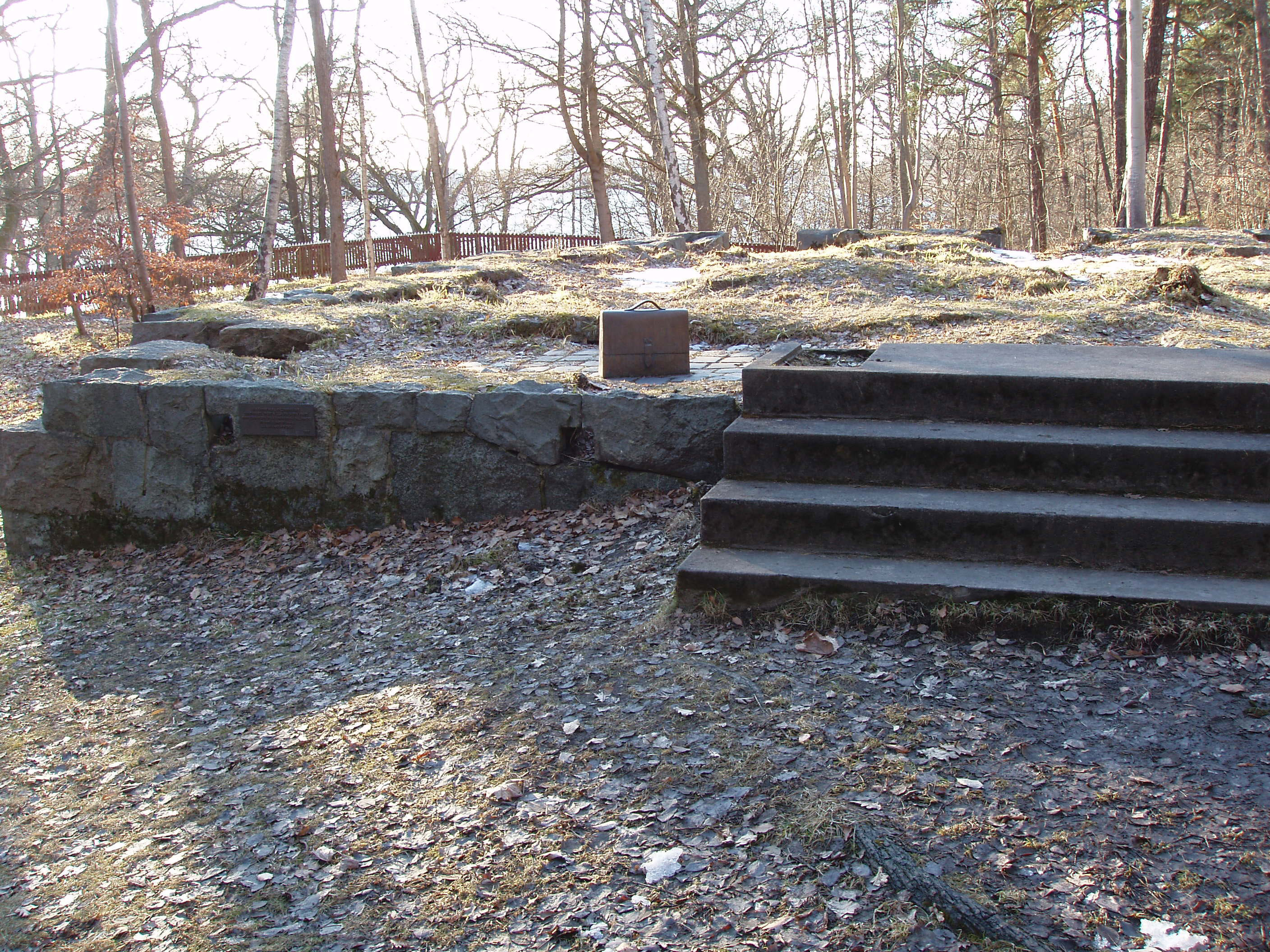 Minnesplats i Kappsta naturreservat på Lidingö över Raoul Wallenberg. Ett minnemärke i form av en portfölj i brons, designad av konstnären Ulla Kraitz är fastmonterad på husgrunden till den sommarvilla där Raoul Wallenberg föddes den 4 augusti 1912. Platsen har fått stå orörd ända sedan 1933 då huset brann ner.